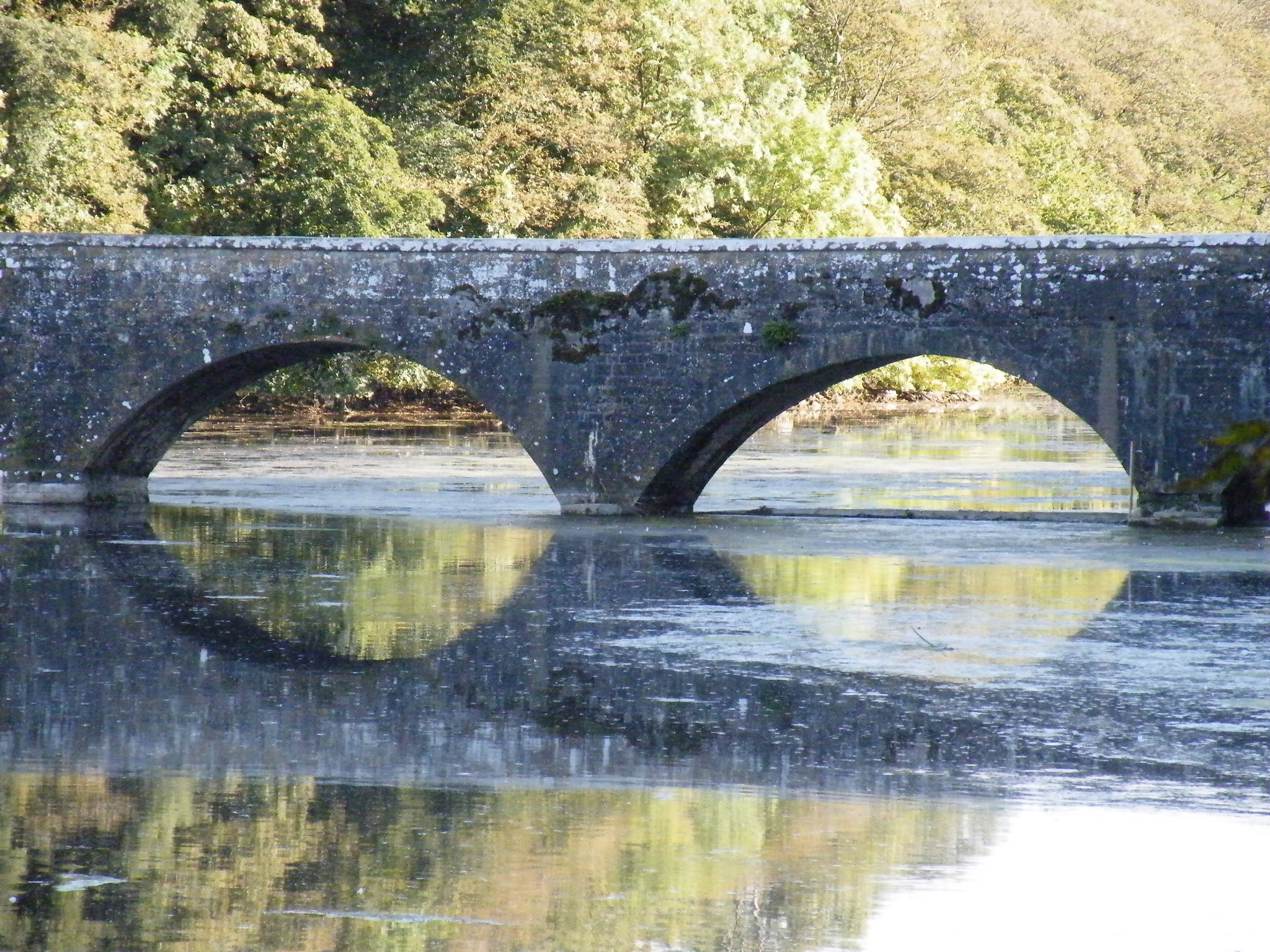 Pont, Y Stagbwll